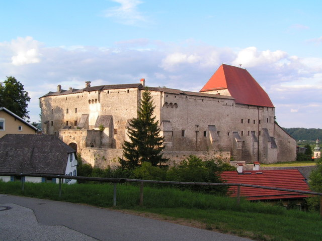 Burg Tittmoning (Landkreis Traunstein)